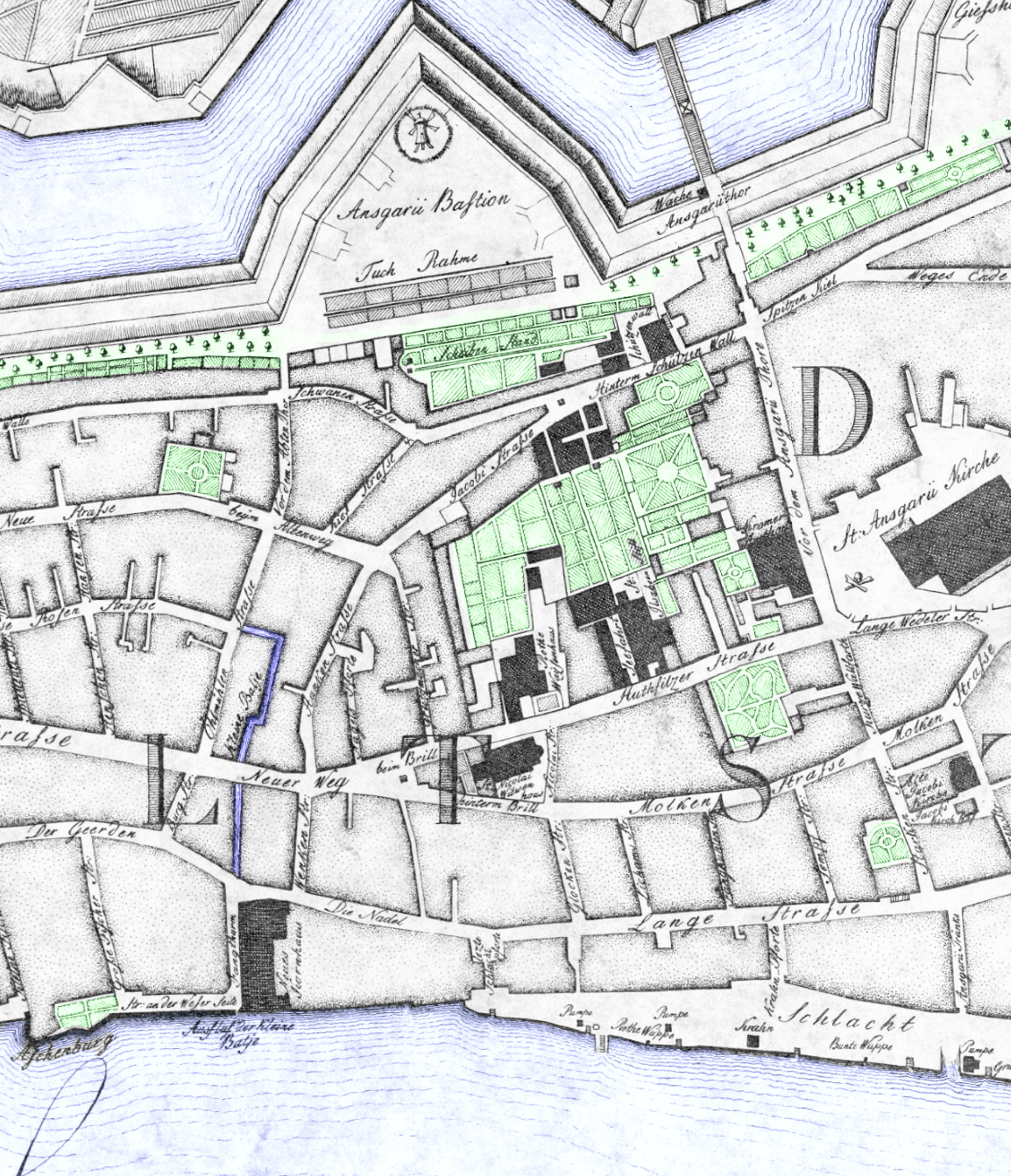 Ausschnitt des Stadtplans von Bremen aus dem Jahr 1796 von Carl Ludwig Murtfeldt, Scan farblich bearbeitet